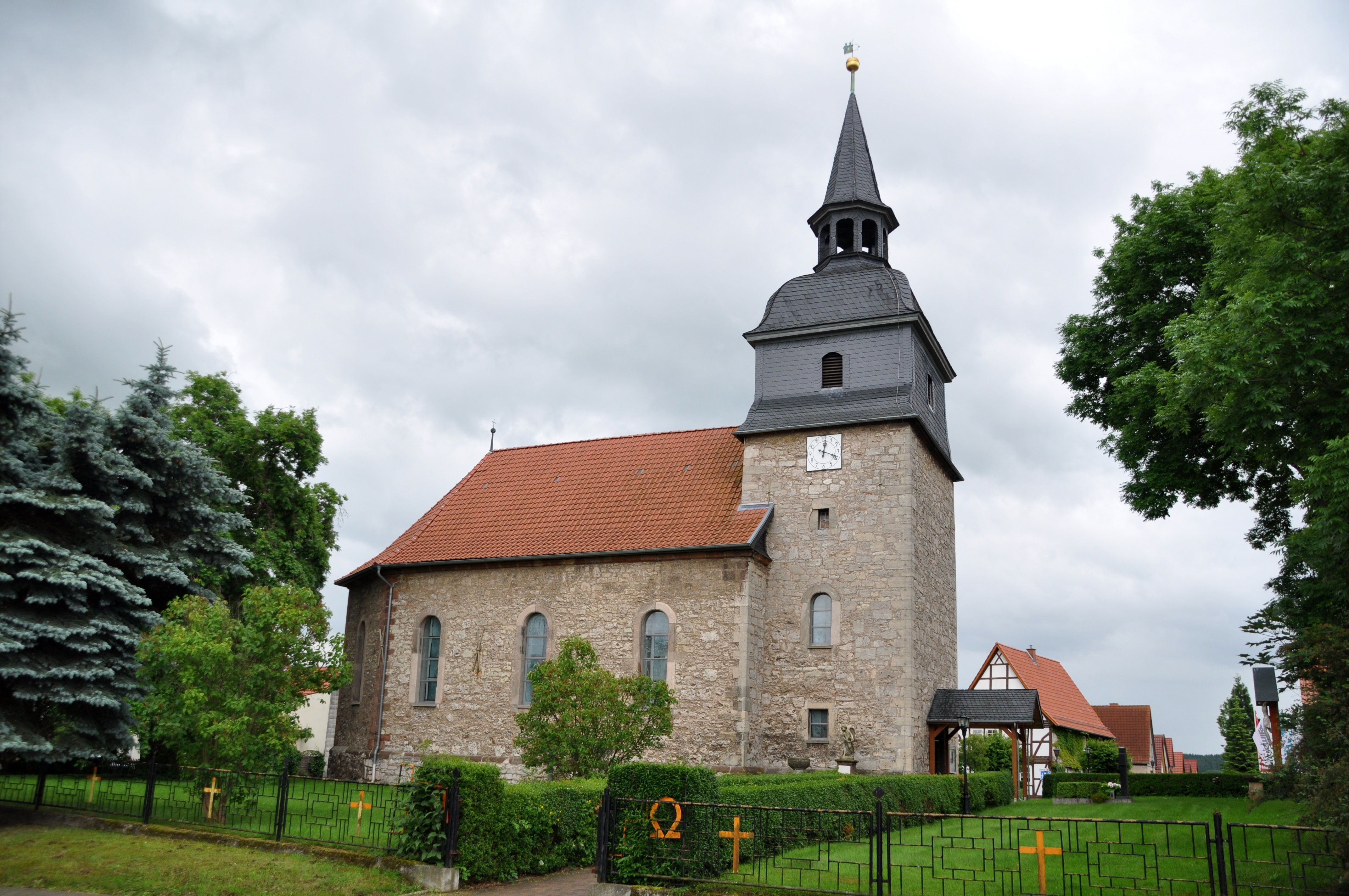 Katholische Kirche Stt. Simon und Judas Thaddäus Neustadt/ Eichsfeld